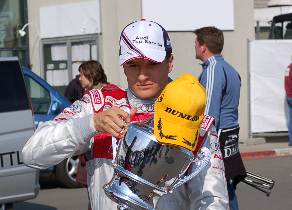 Timo Scheider nach seinem ersten DTM-Sieg mit Trophäe